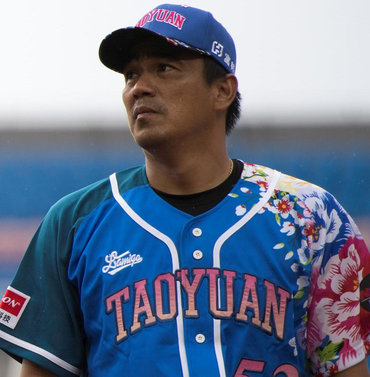 06.11 陳金鋒場上英姿